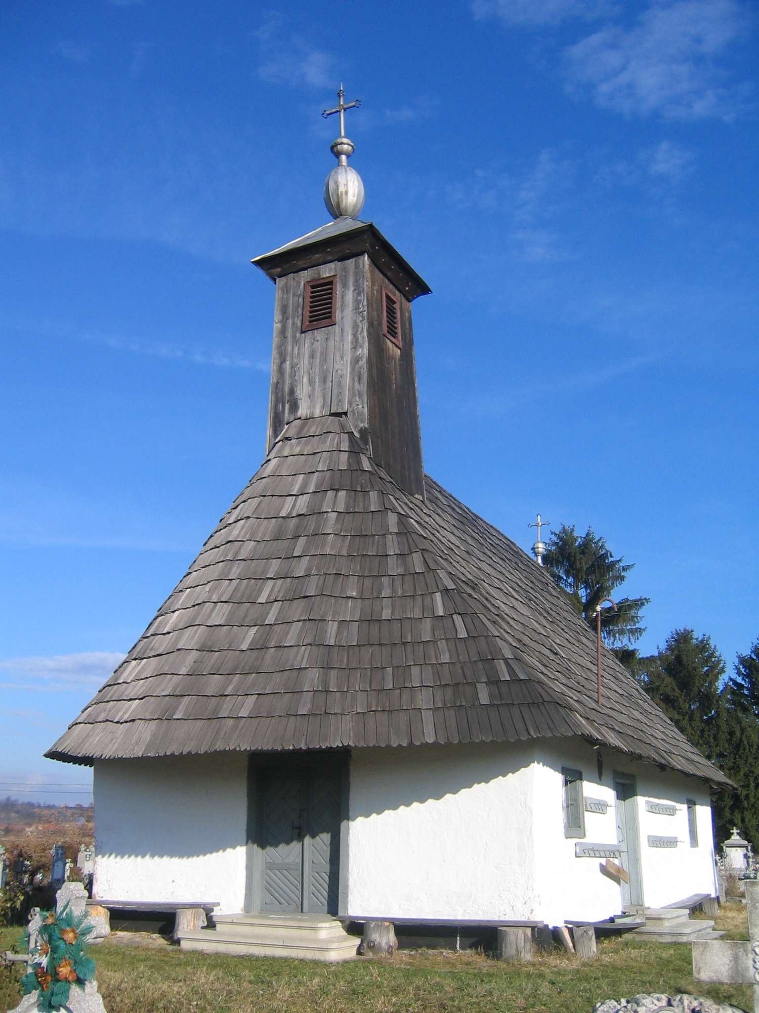 Biserica de lemn "Cuvioasa Paraschiva", din satul Margina, judeţul Timiş, construită în ro:1737. Licensing Categorie:Imagini din Banat